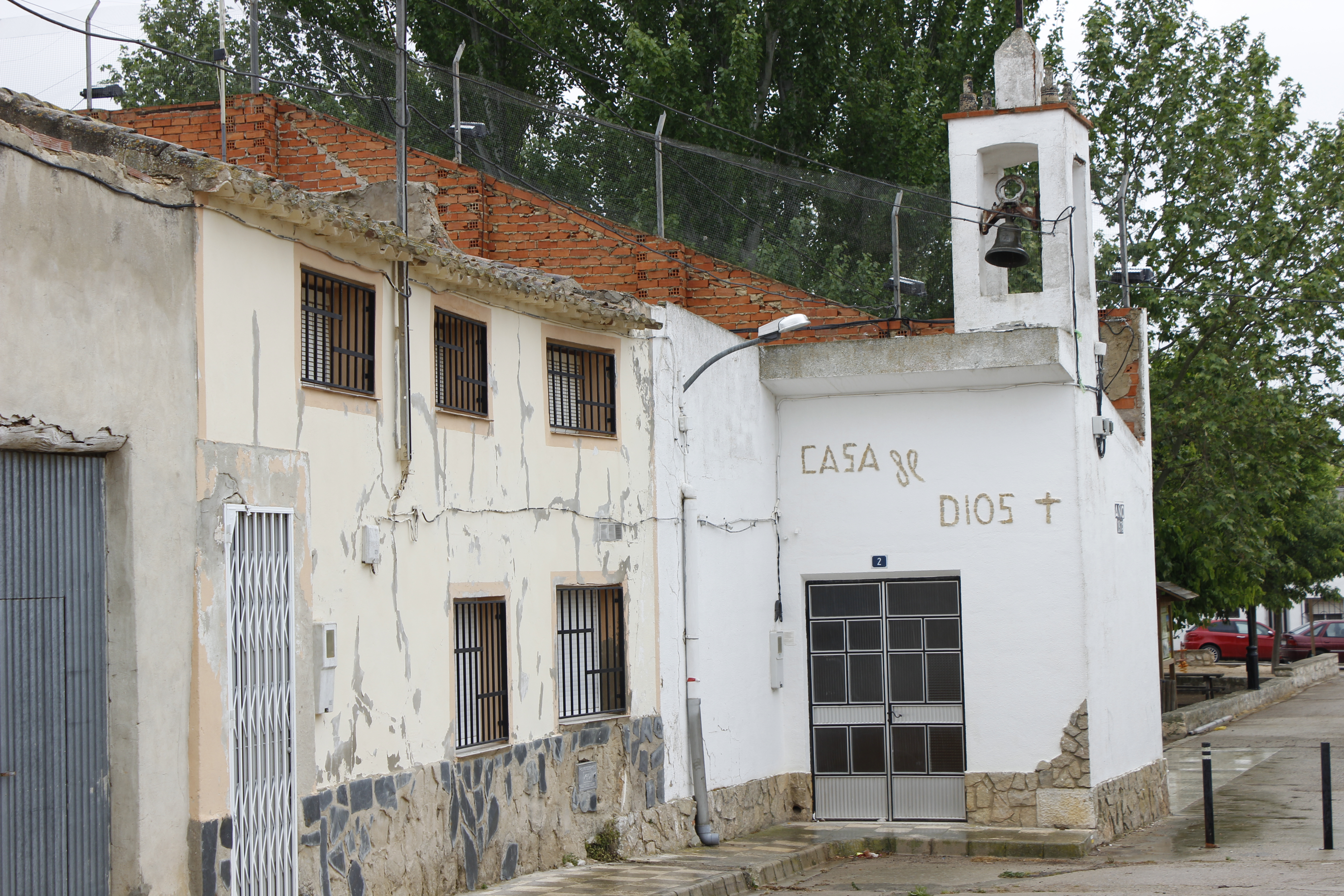 Pendiente.